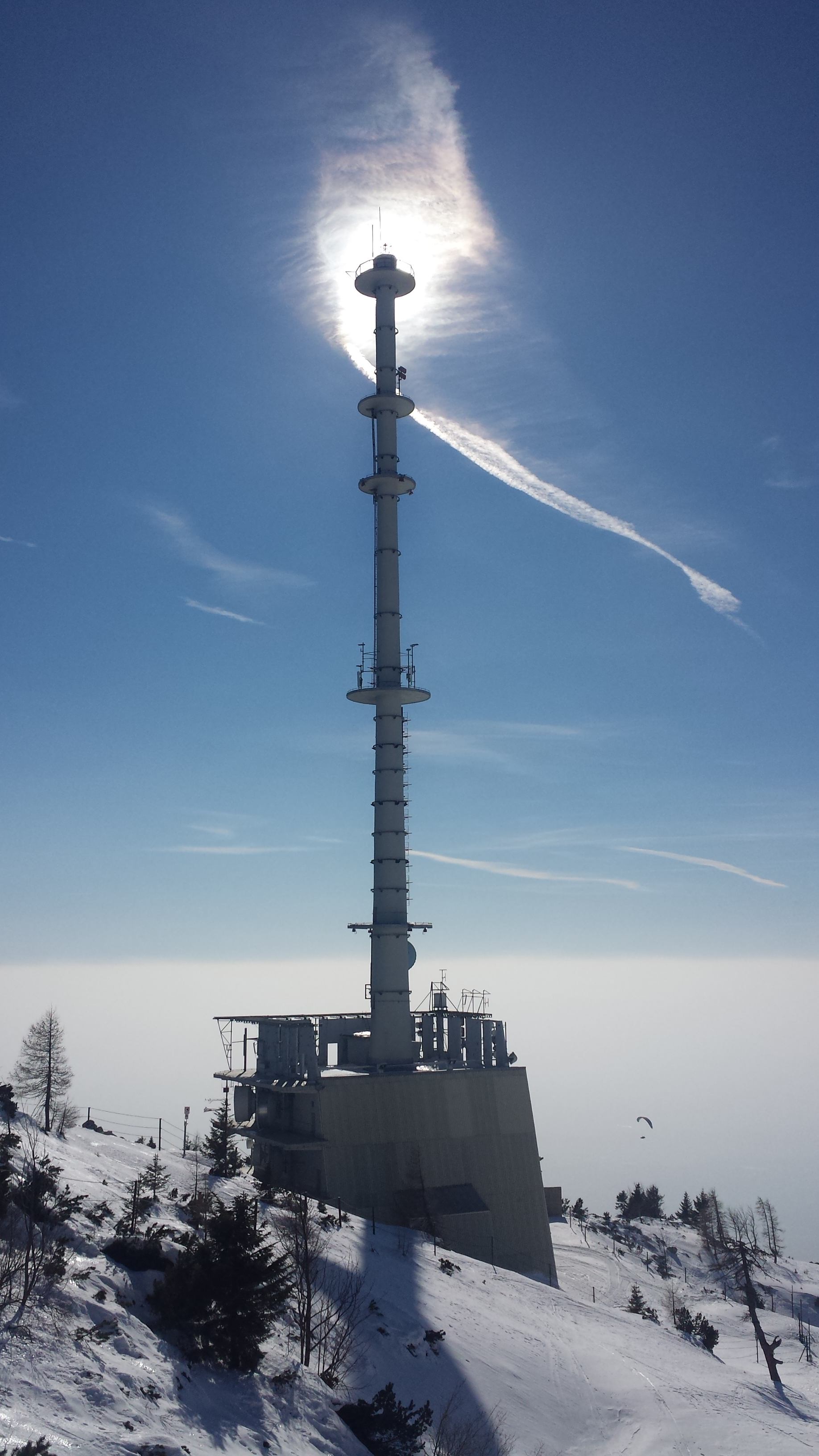 Krvavec, oddajnik.